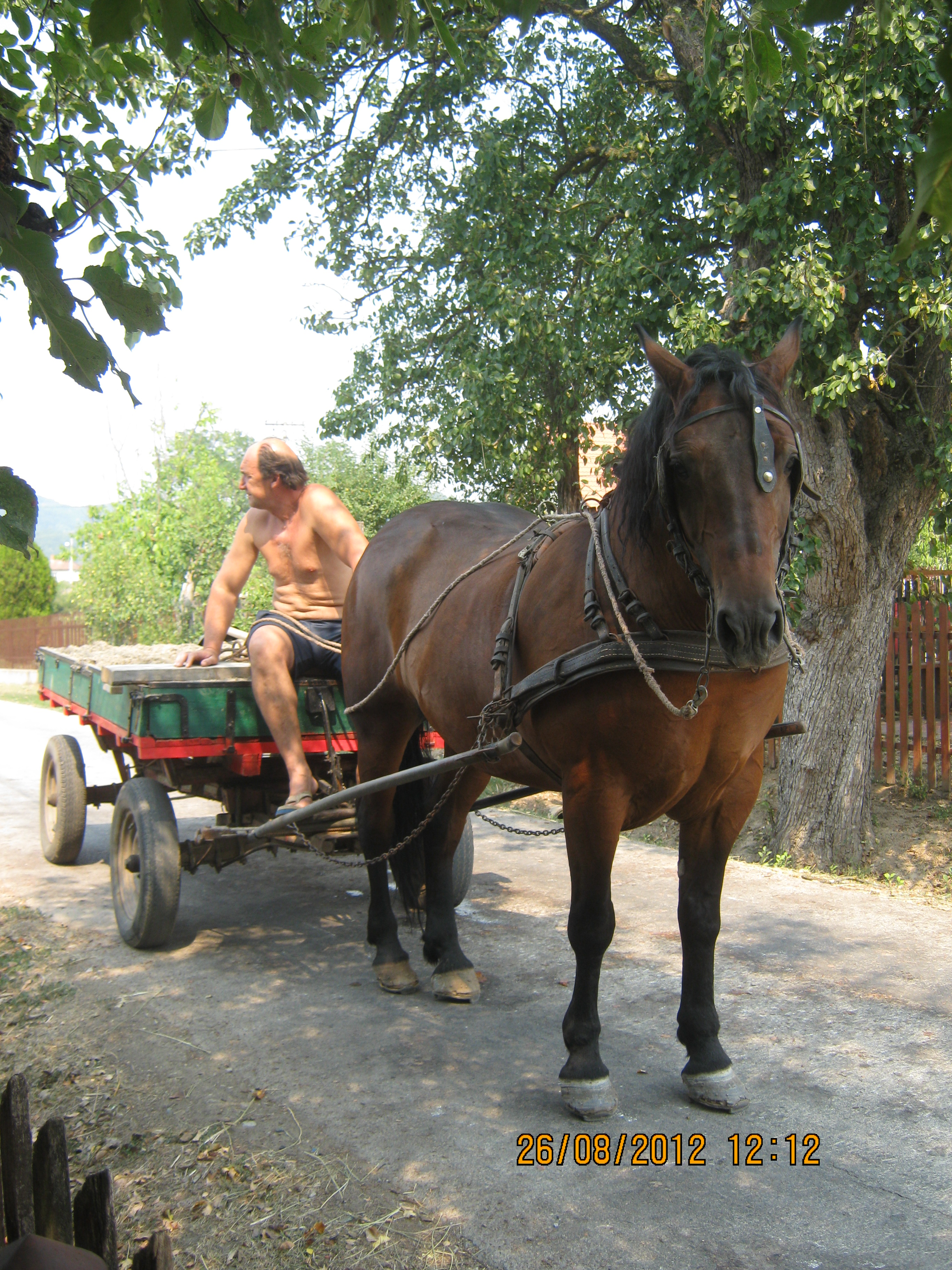 Радојица Баралић са својим љубимцем.